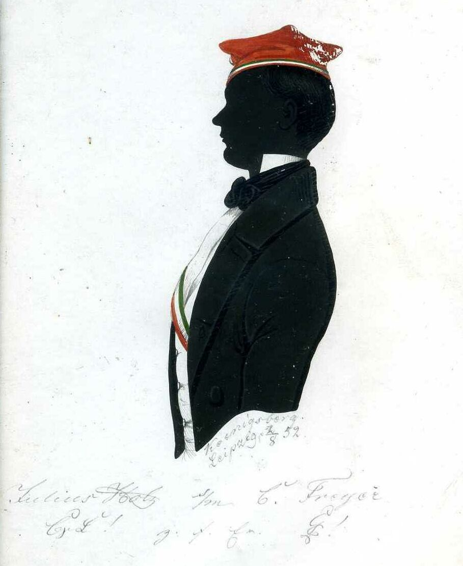 Silhouette von Julius Holz, Angehöriger der Landsmannschaft Littuania Königsberg